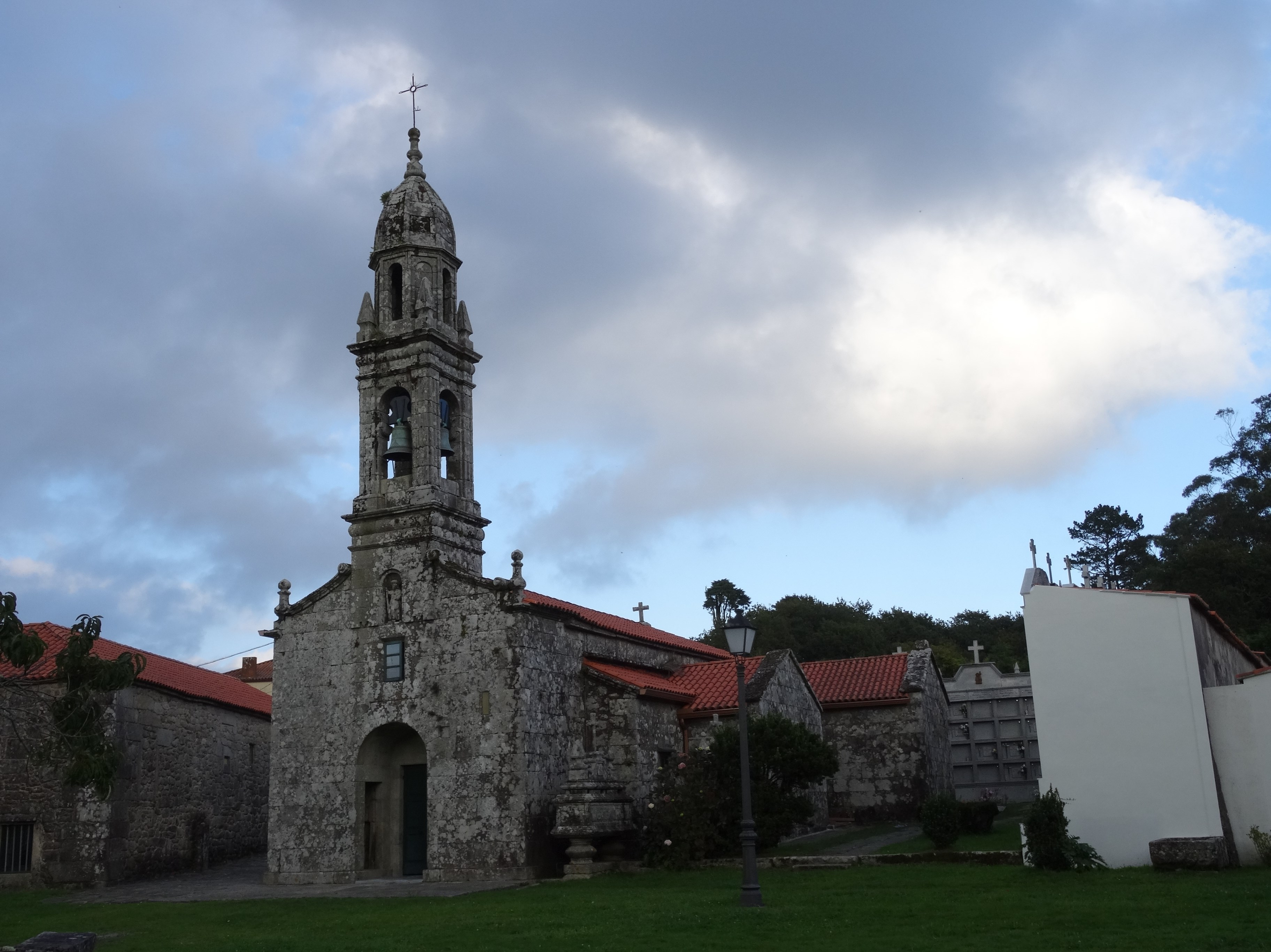 Igrexa de Santiago de Berdeogas, Dumbría, provincia da Coruña.